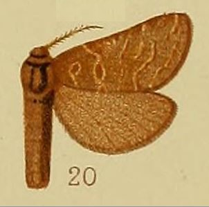 Eudalaca holophaea